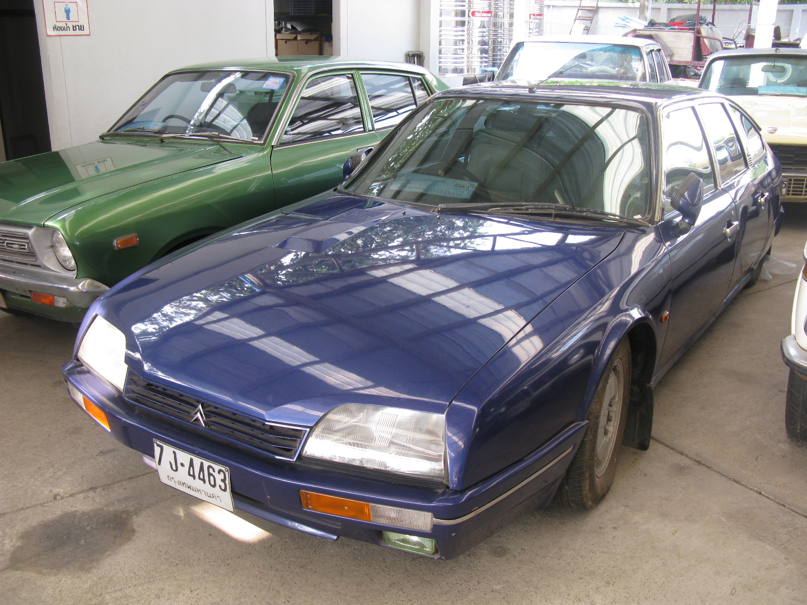 Jesada Technik Museum